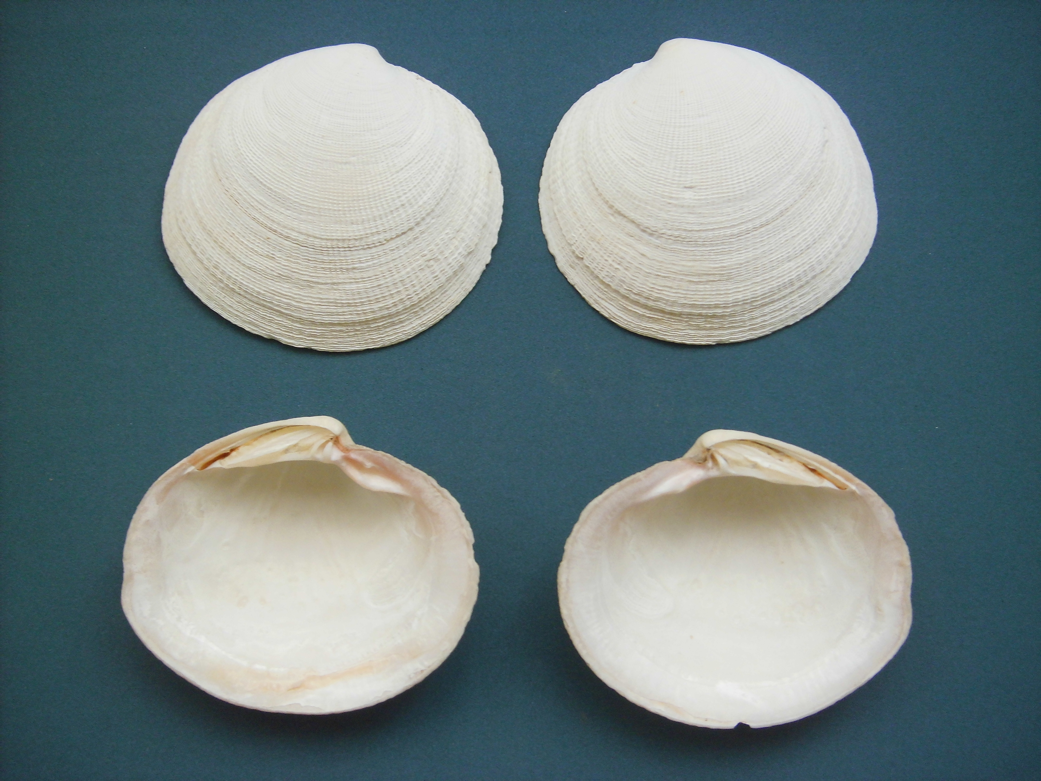 Codakia orbicularis (Linnaeus, 1758) Isla La Orchila, Cayo Noeste Depedencias Federales - Venezuela colectada en 1999.